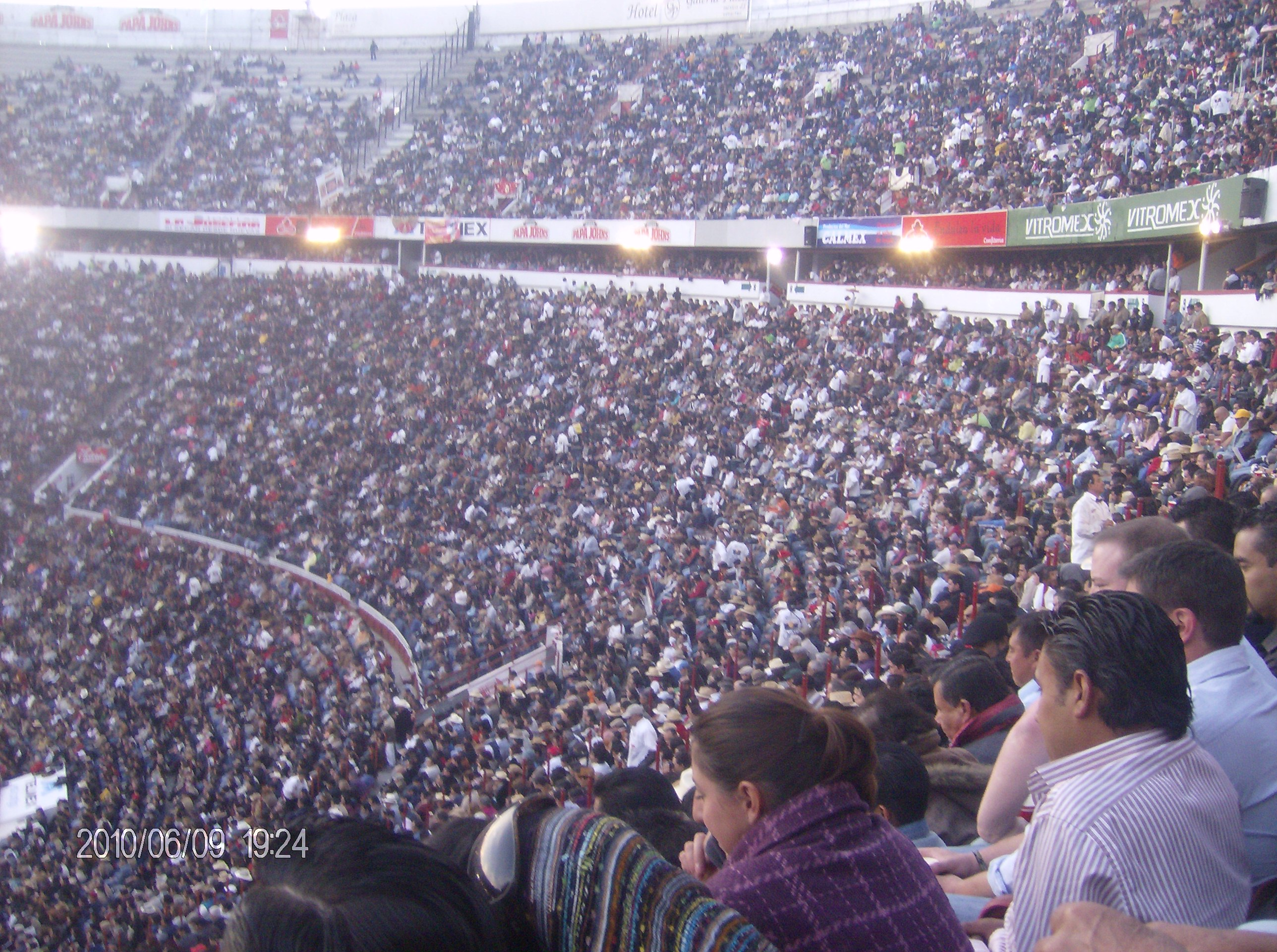 Foto de los Tendidos de la Monumental de Mexico el dia 7 de noviembre del 2010